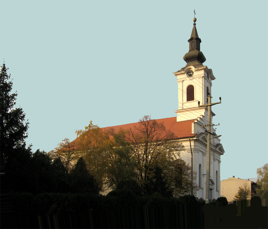 Evangelistička-Slovačka crkva u Kulpinu nakon rekonstrukcije 2009. godine